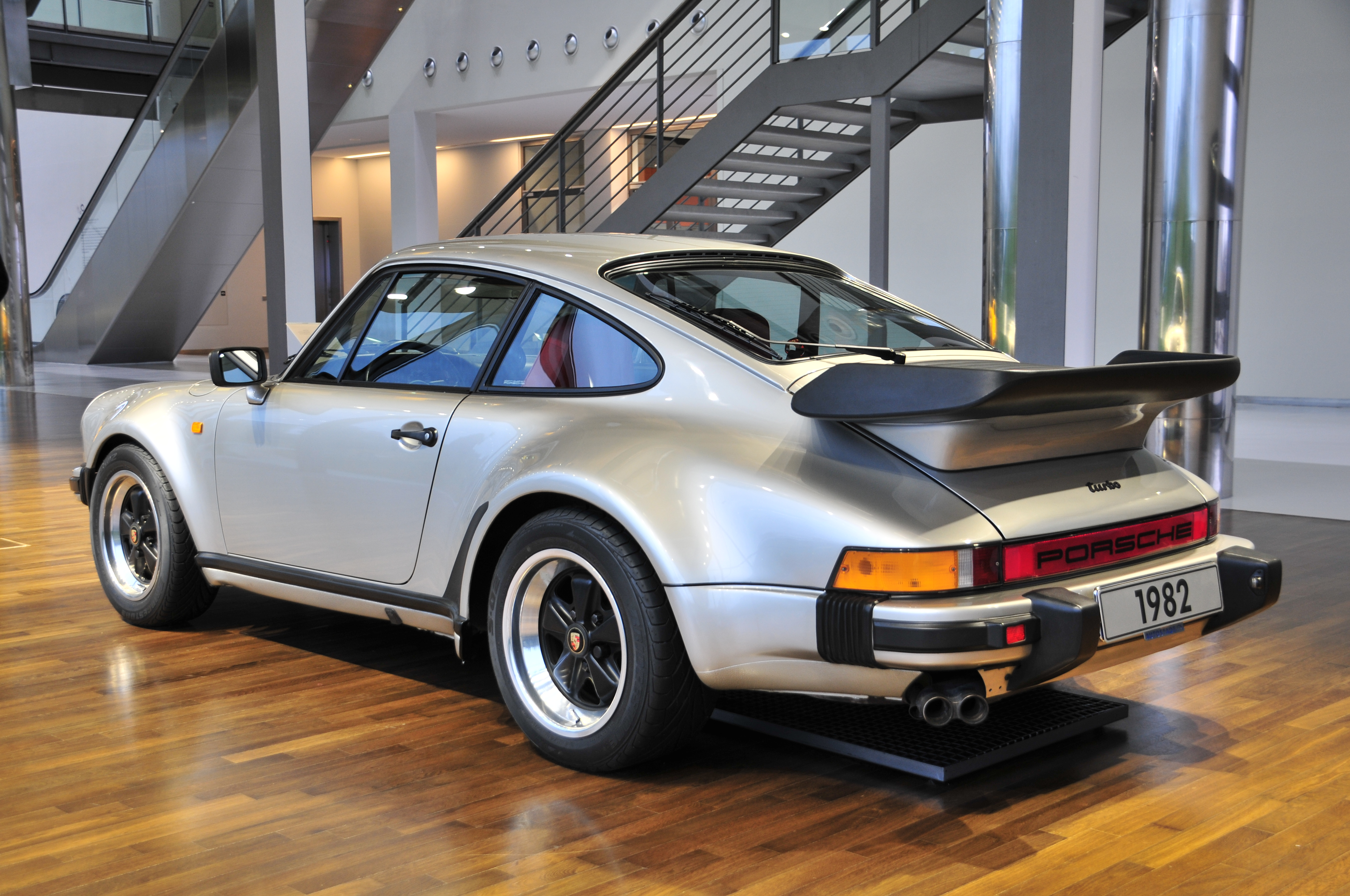 Fahrzeug in der Autostadt Wolfsburg